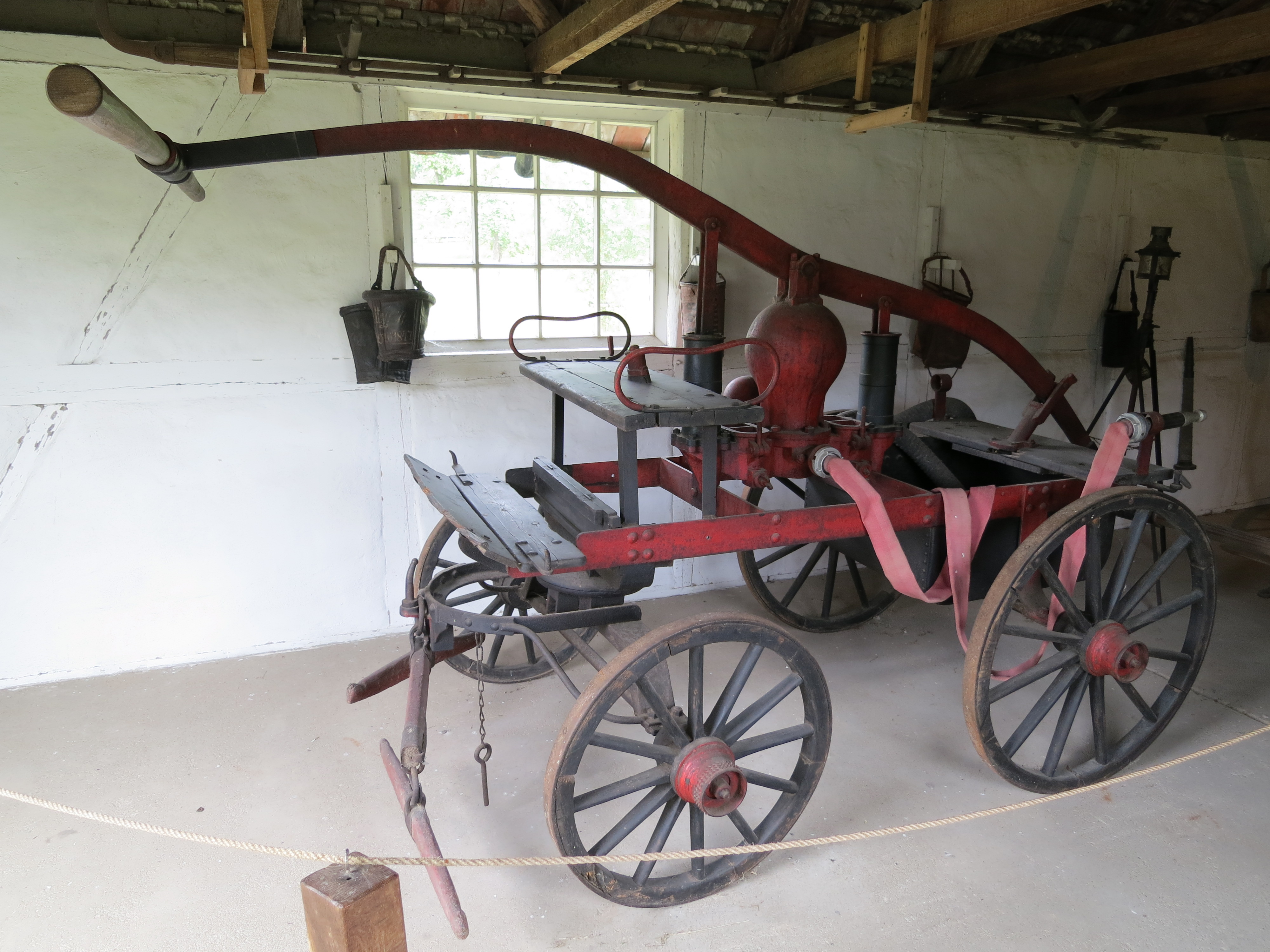 Handdruckspritze für Pferdebespannug aus der Zeit um 1900